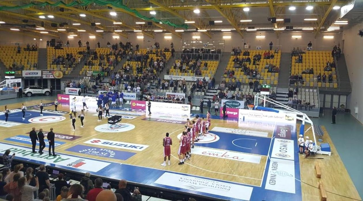 Koszalin. AZS - Spójnia (27.10.2018)